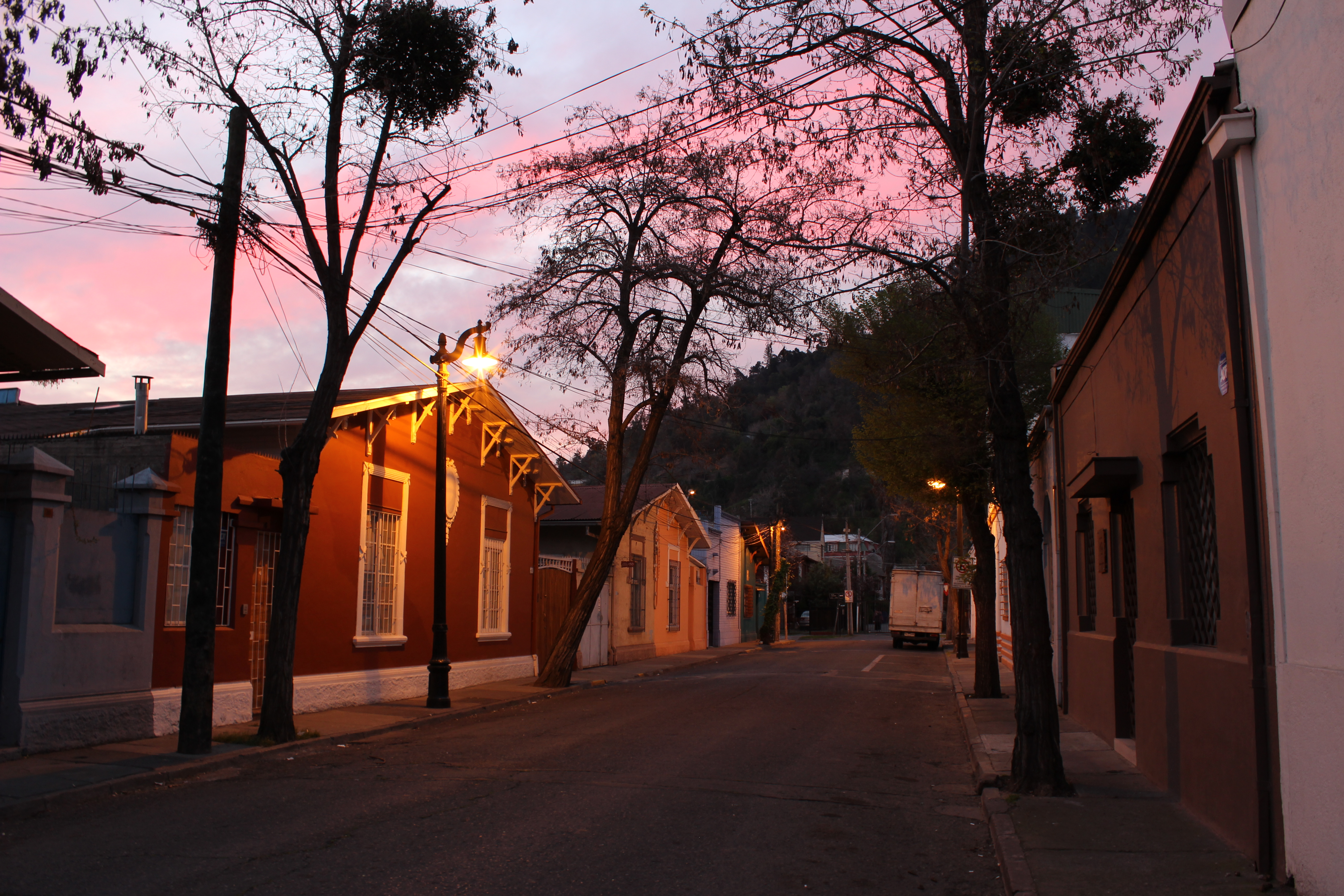 Calle Punta Arenas This is a photo of a national monument in Chile: 246